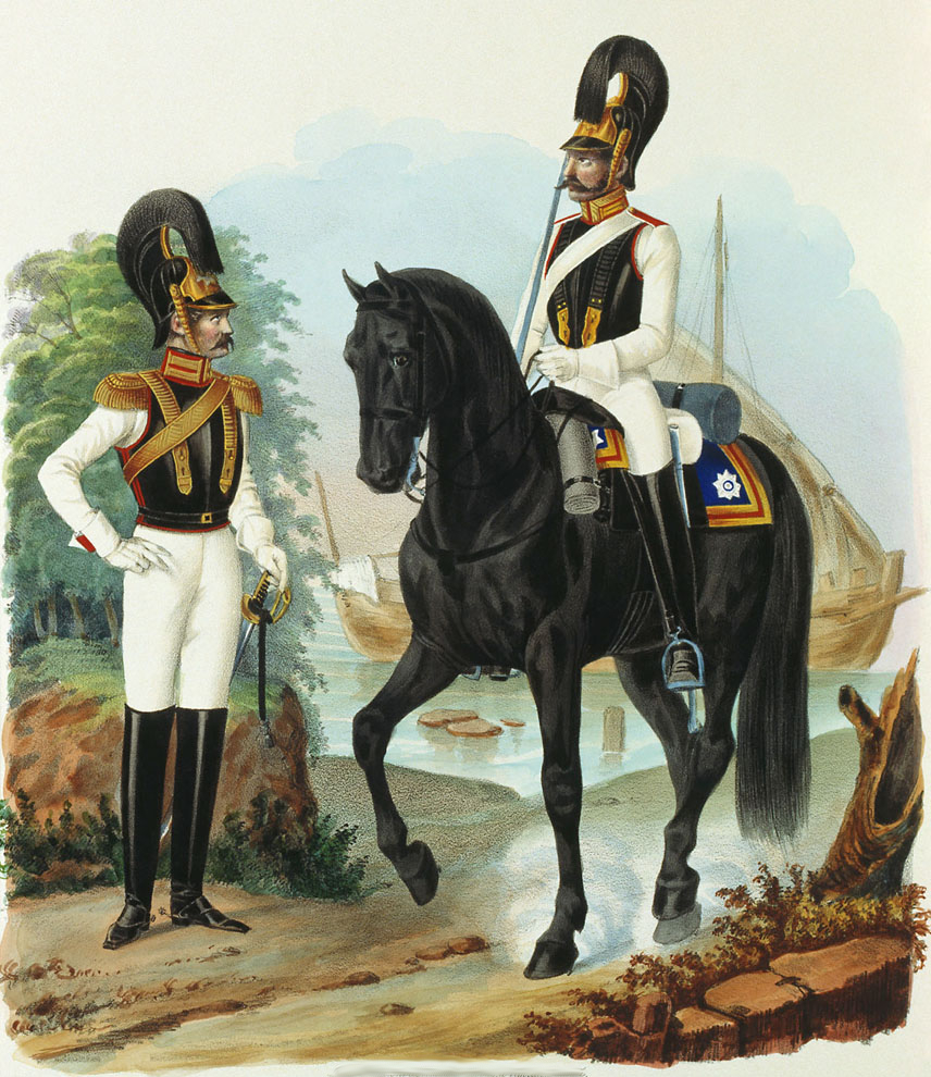 Штаб-офицер и унтер-офицер Лейб-Гвардии Конного полка, 1814-1828.